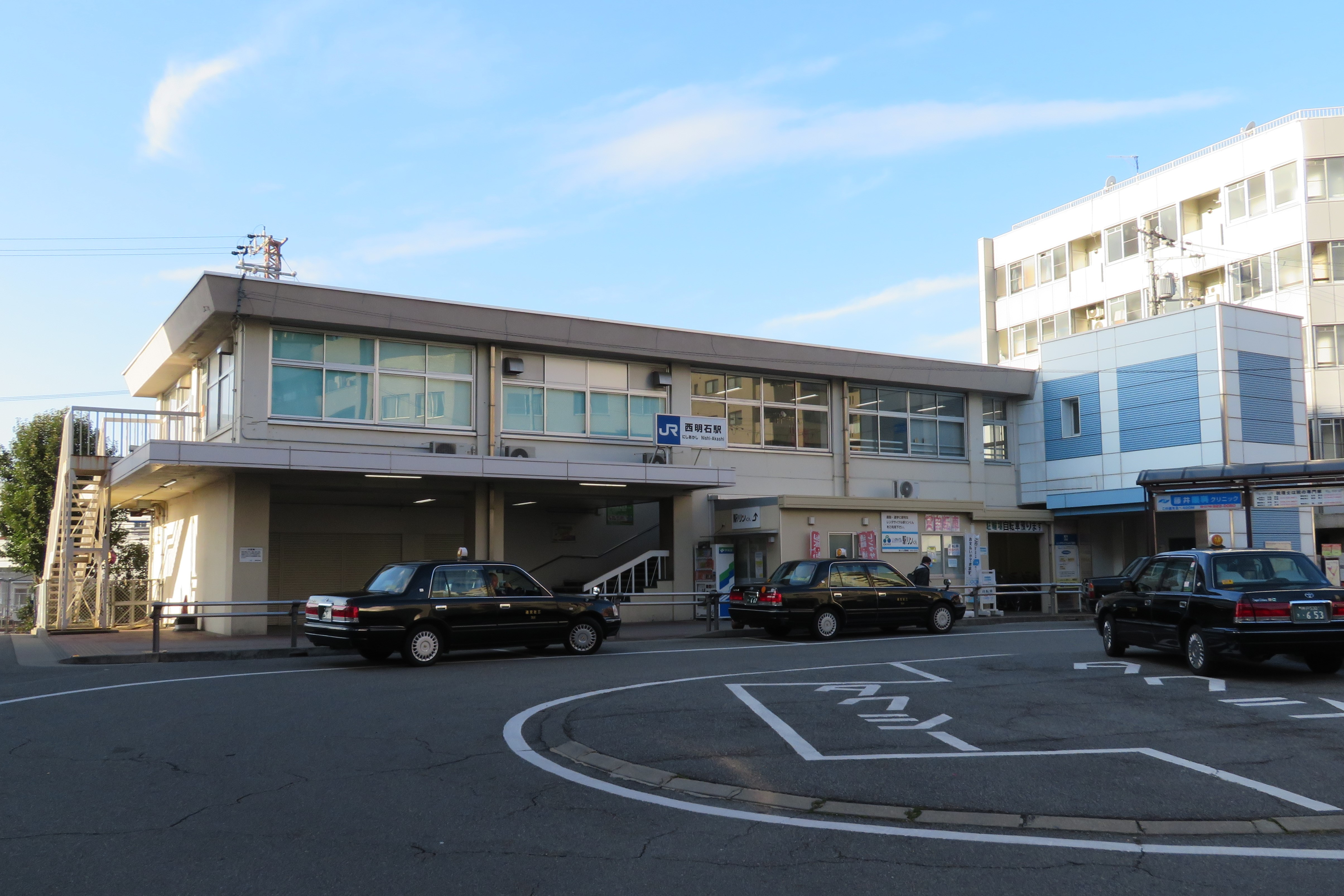 JR西明石駅東口